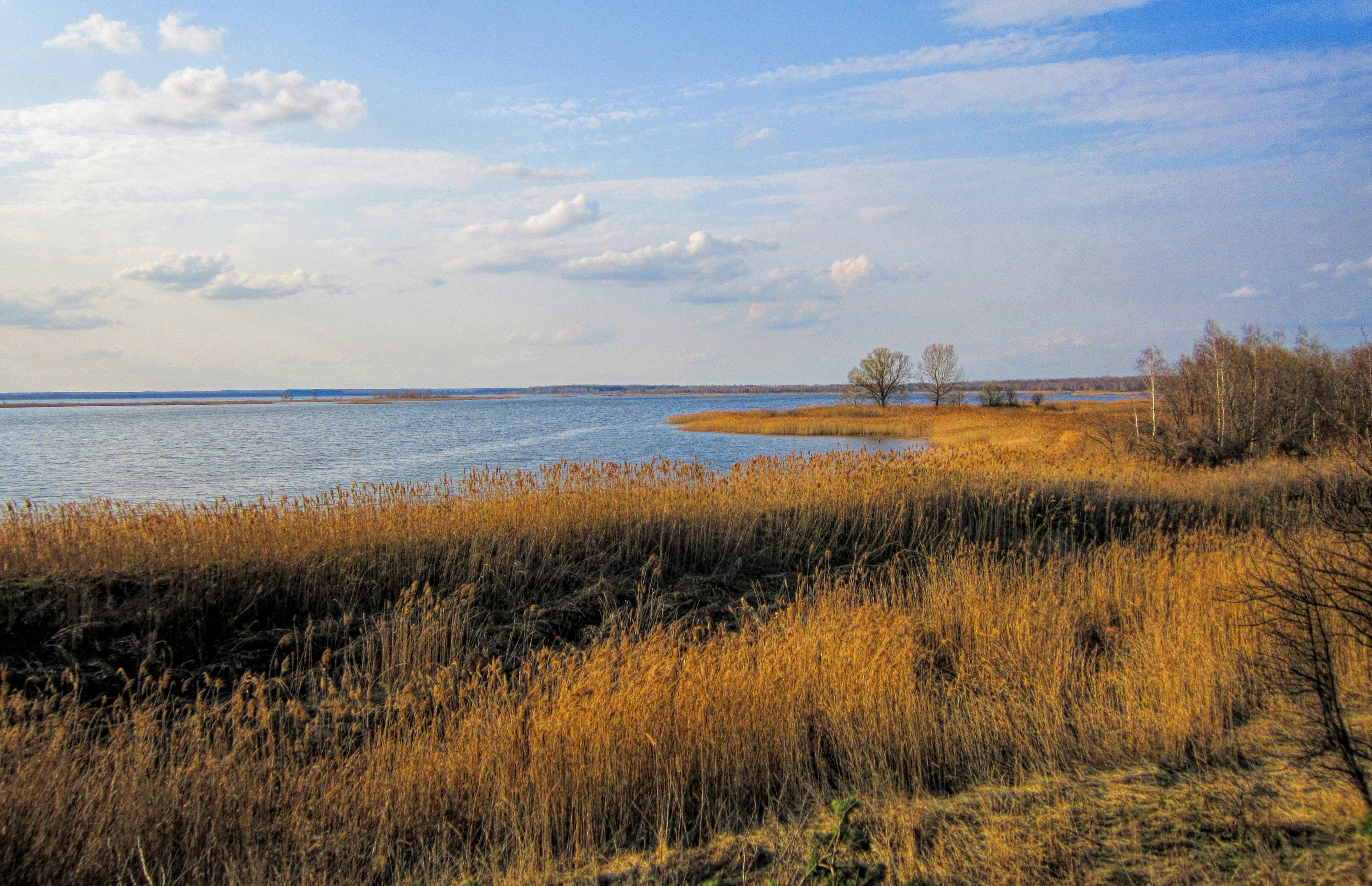 Кожановское озеро: Крайние точки: 52,7667° - 52,8054° с.ш., 31,6633° - 31,7184° в.д., Гордеевский район, Брянская область This image is related to the protected area of Russia number 3210057